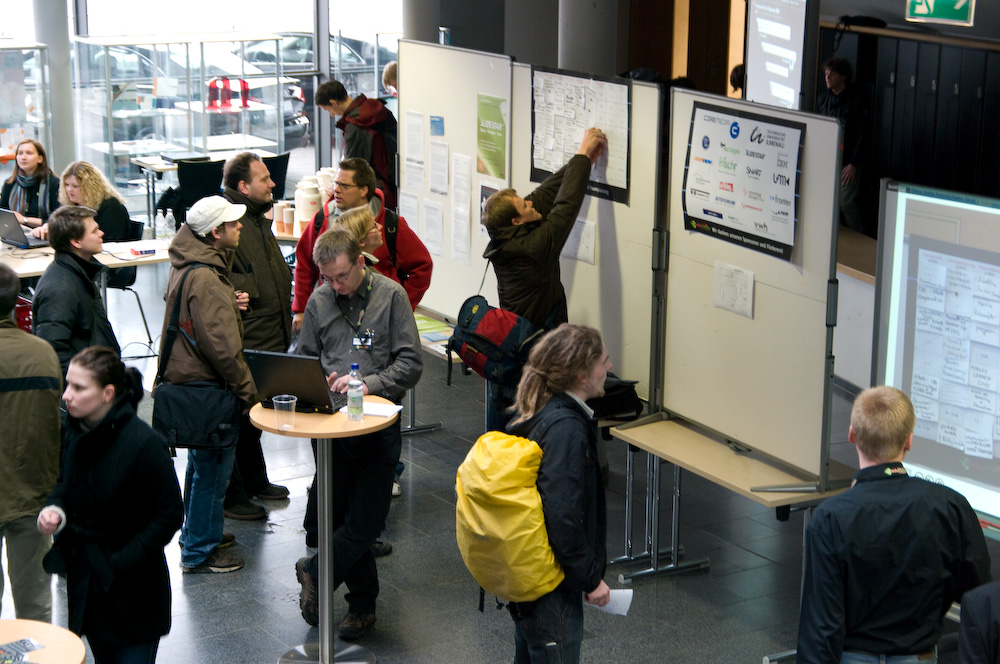 Teilnehmer eines EduCamp in Ilmenau zwischen zwei Sessions.